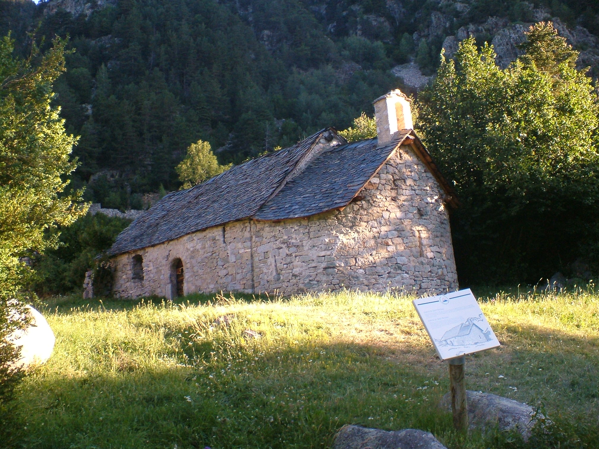 Ermita de Sant Nicolau; la Vall de Boí, Alta Ribagorça, Catalunya